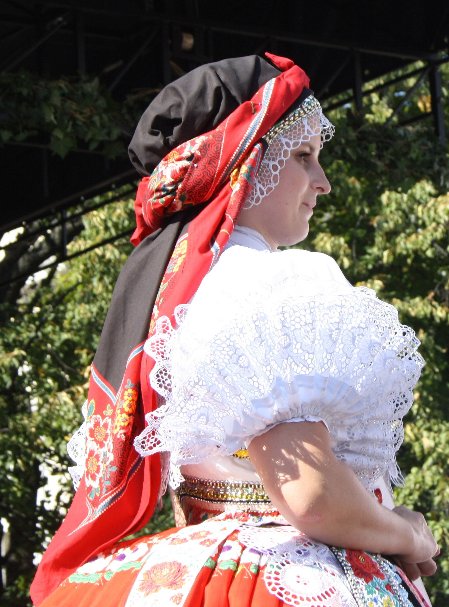 Rukávce kroje svobodné ženy z Moravského Slovácka (Slovácké slavnosti vína a otevřených památek v Uherském Hradišti 2011).